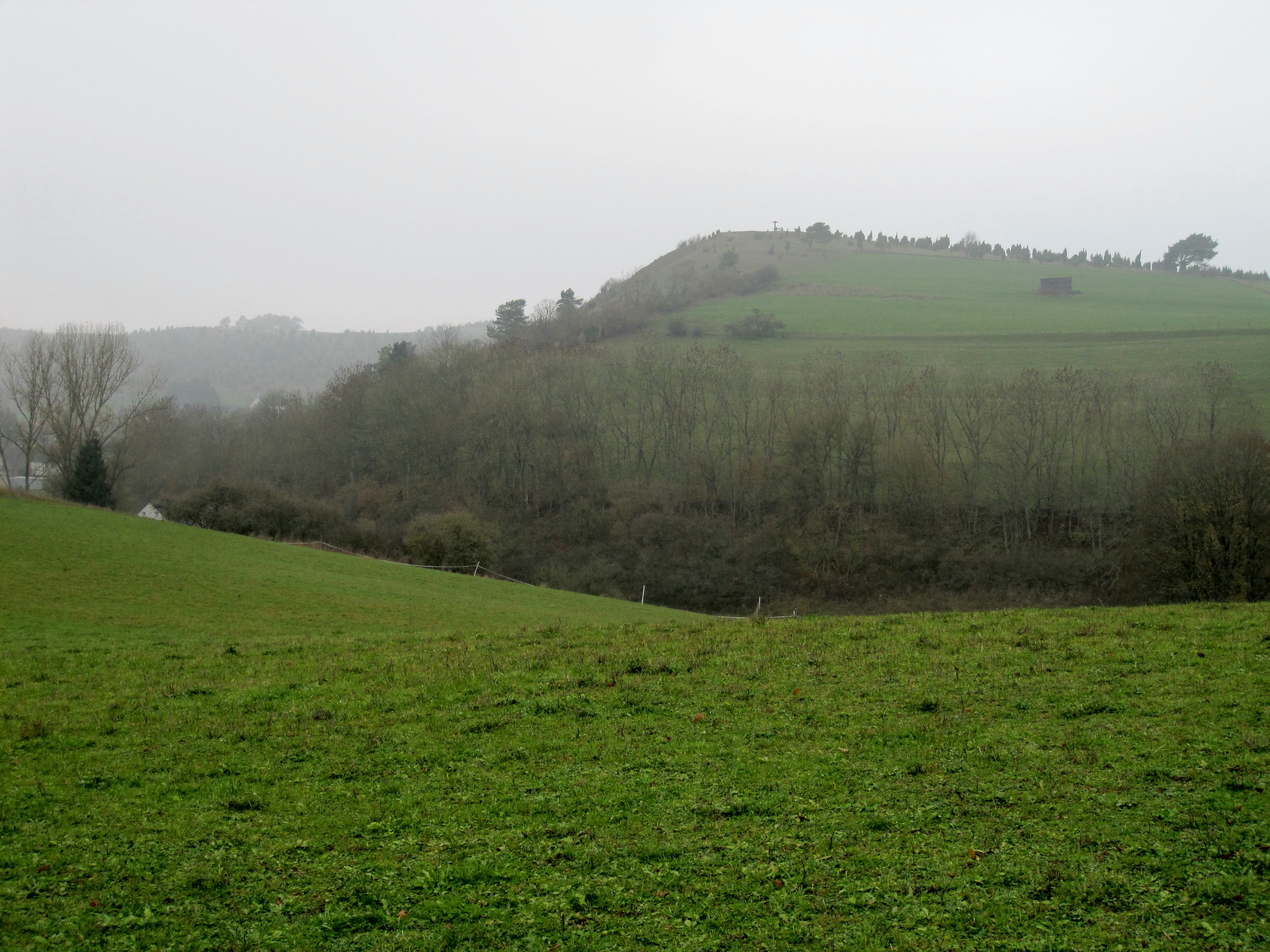 Kalvarienberg (Alendorf)